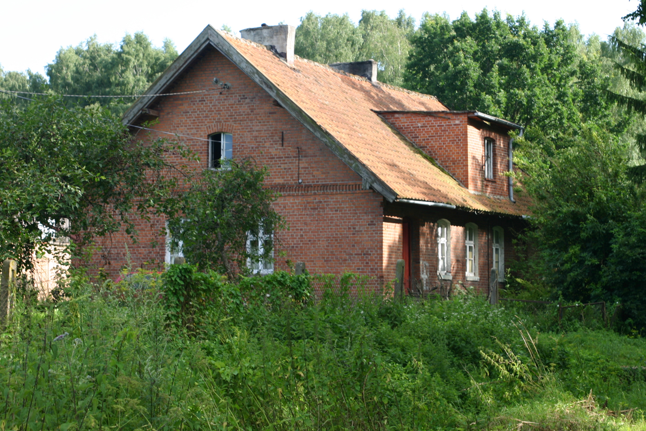 Skandawa